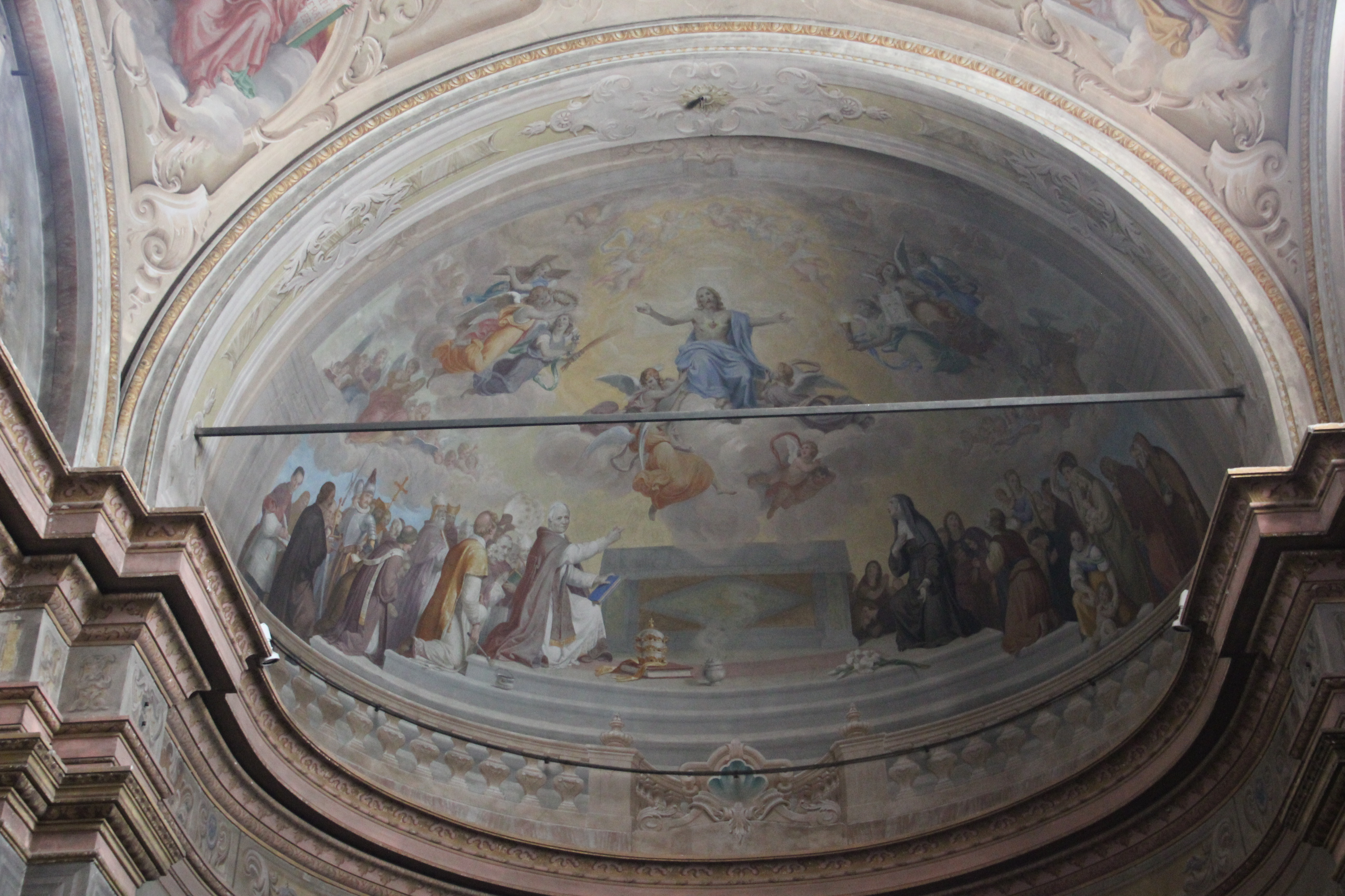 affresco del catino dell'abside